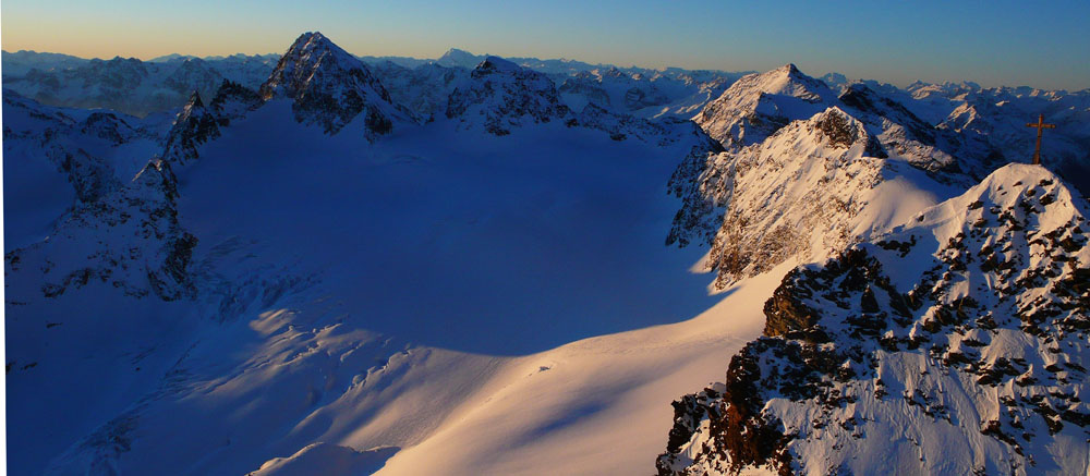 Das Gebiet um den Ochsentaler Gletscher. Vordergrund: Silvrettahorn; hinten links: Piz Buin (3312m)